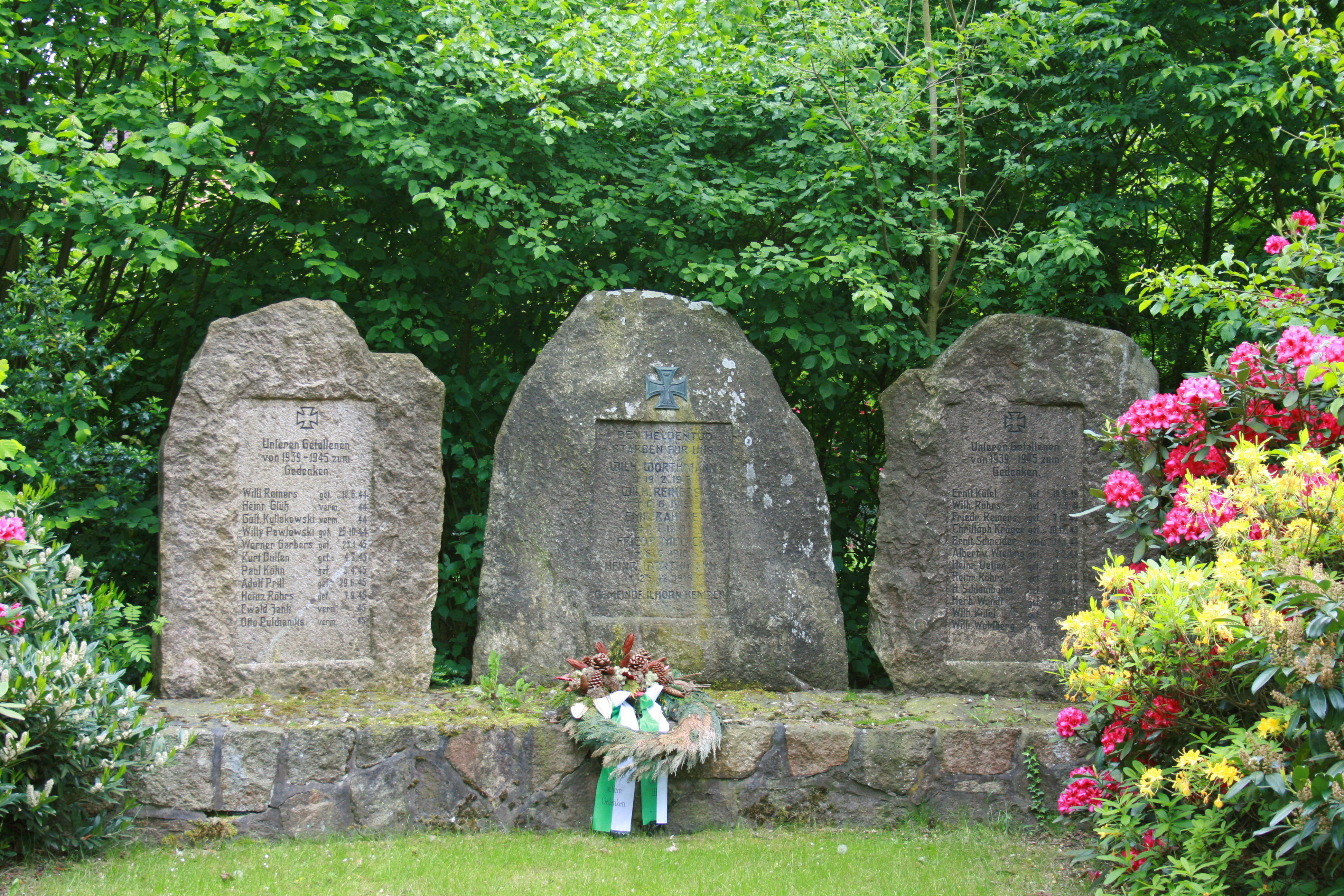 Ilhorn, Ortsteil vom Neuenkirchen (Lüneburger Heide)